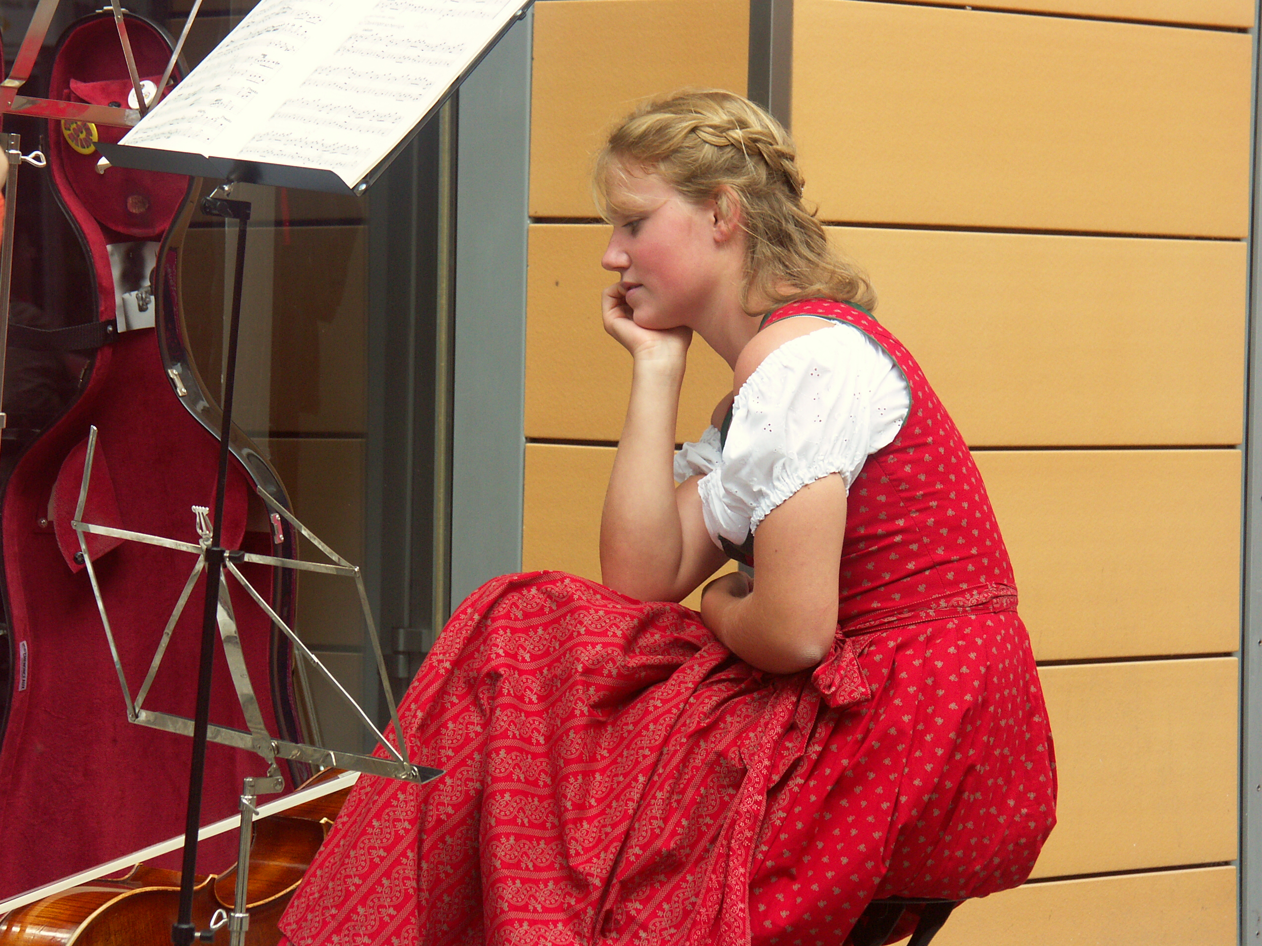 Oktoberfest